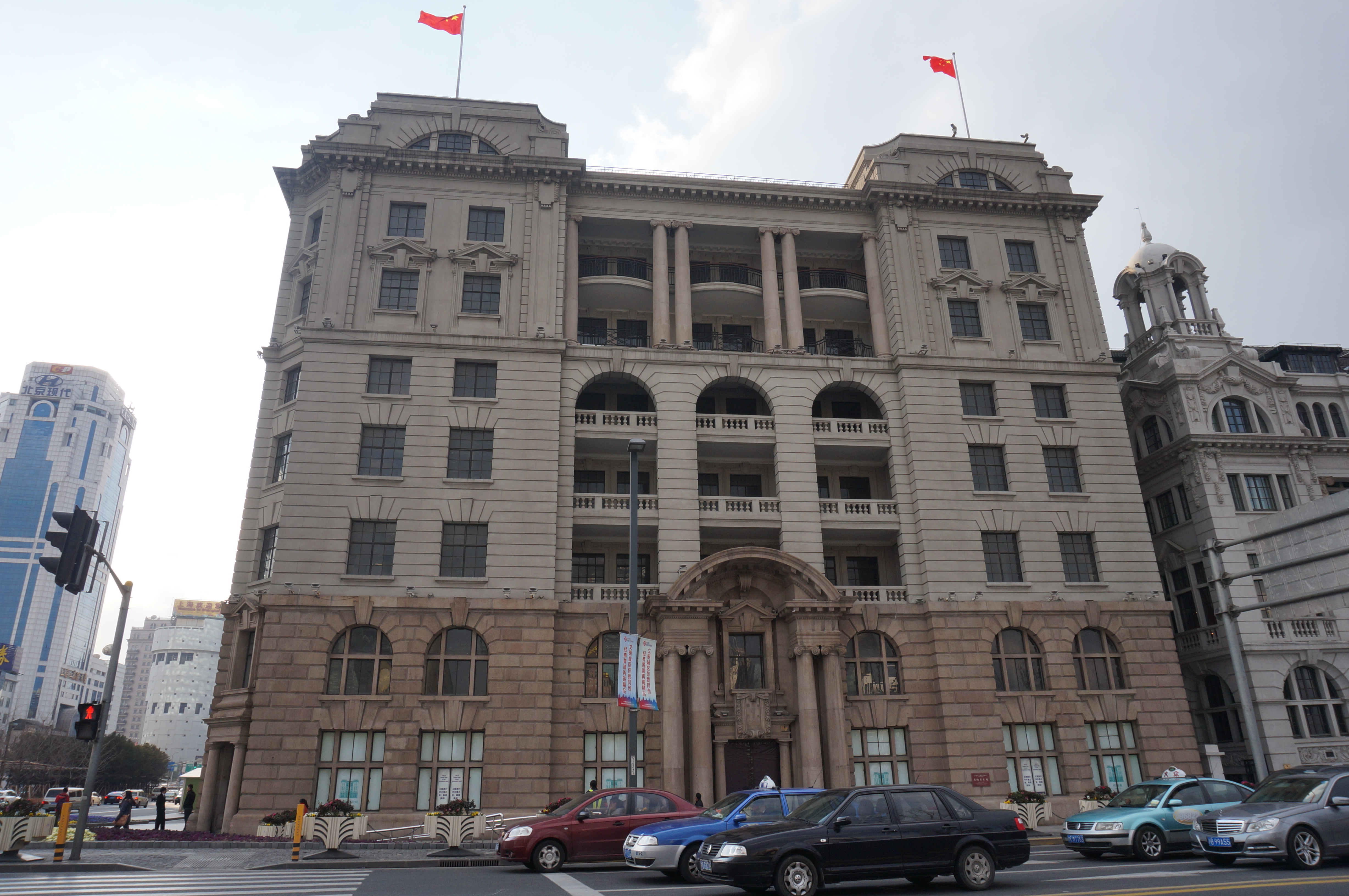 中文（中国大陆）: 外滩亚细亚大楼